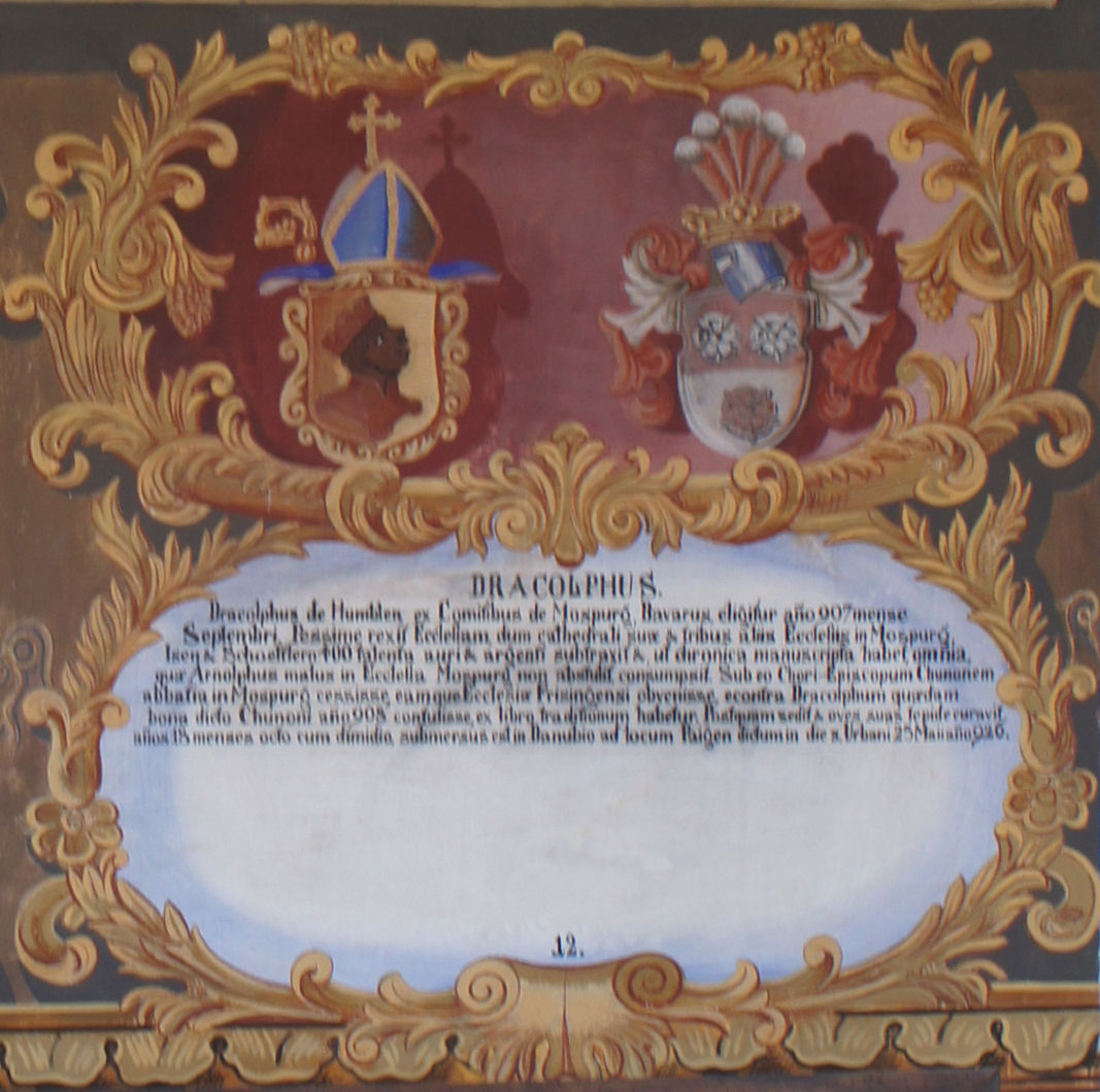 Wappentafel von Dracholf, Bischof von Freising, im Fürstengang zwischen Fürstbischöflicher Residenz und Freisinger Dom. Links das geistliche, rechts das persönliche Wappen, darunter ein lateinischer Text mit kurzer Biographie.